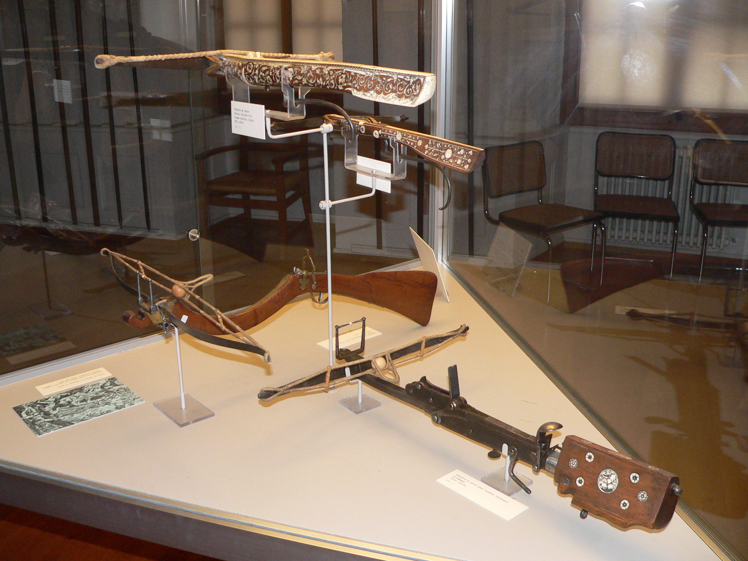 arbalètes, musée du chateau de Morges, Suisse.